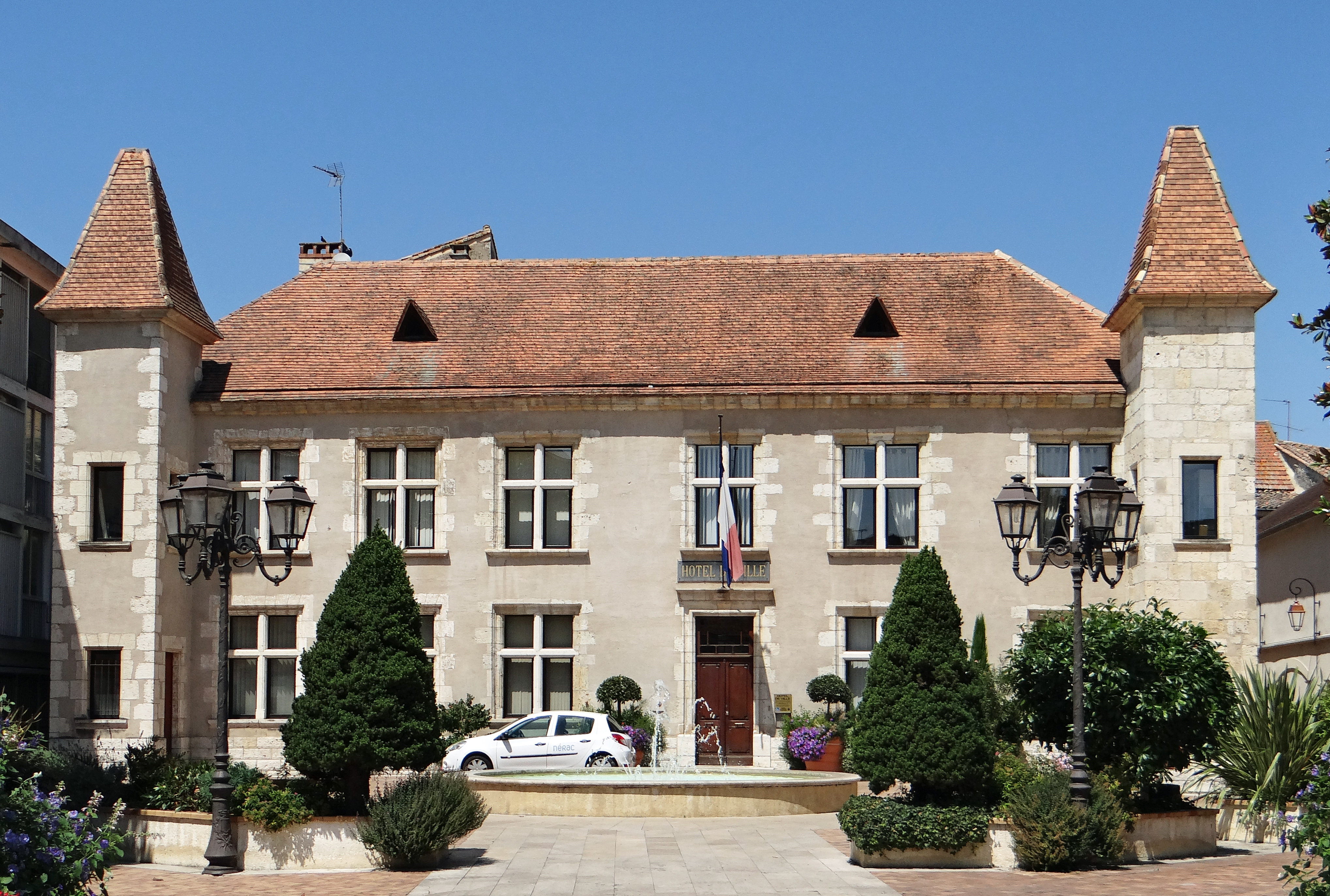 Nérac - La mairie, place du Général-De-Gaulle